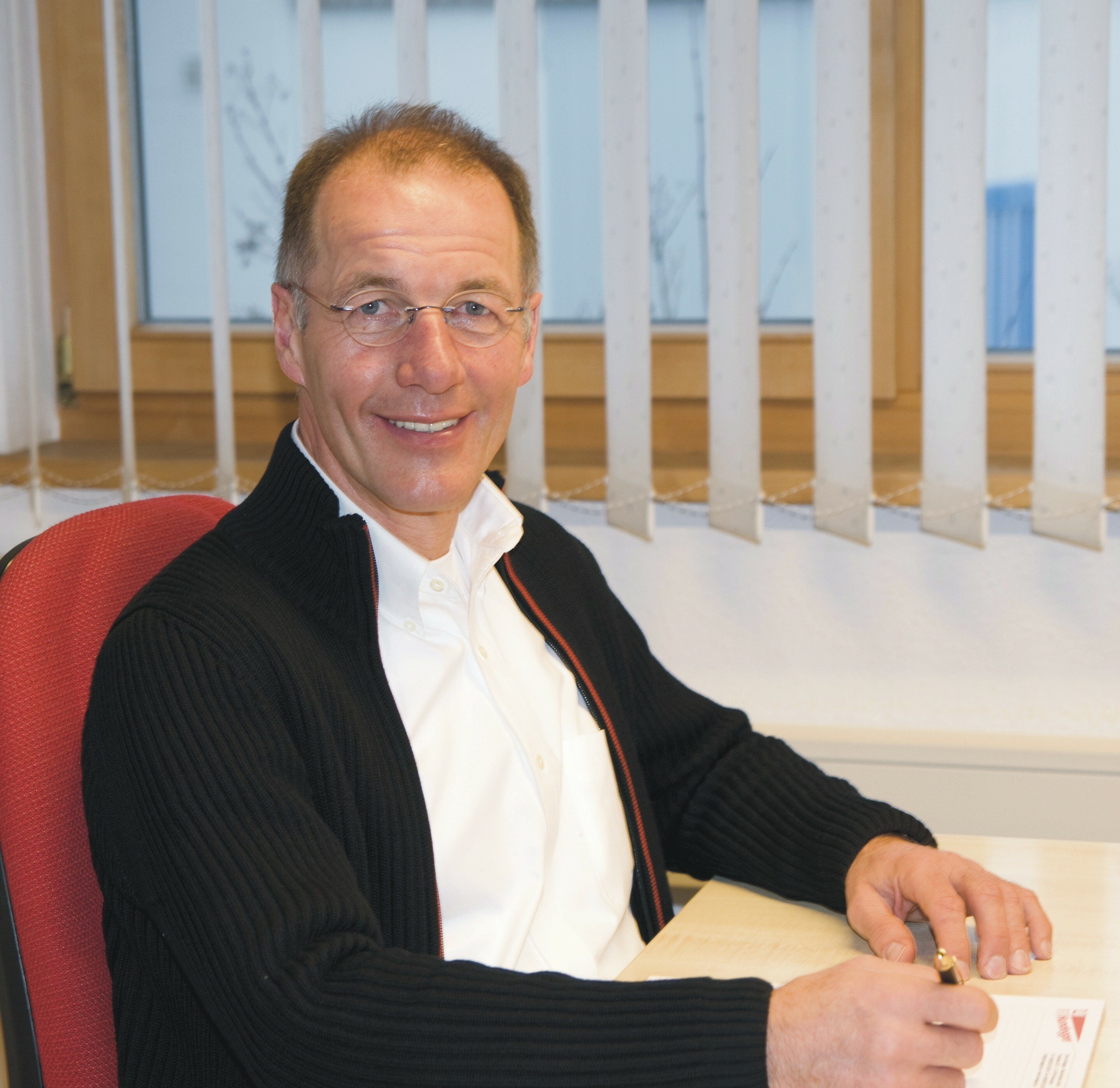 Holzabbundanlagenpionier Hans Hundgger